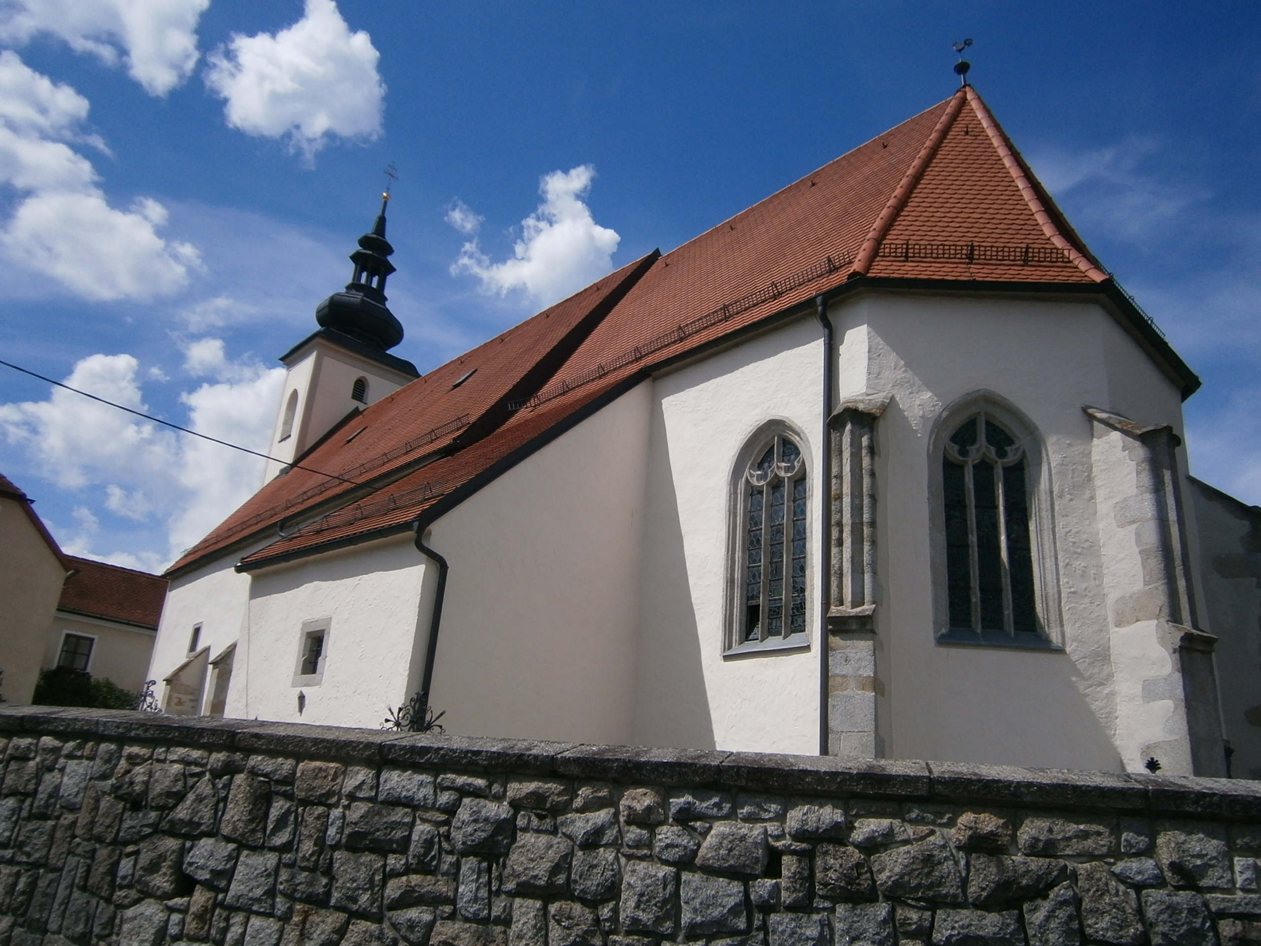 Object location48° 30′ 30.3″ N, 14° 26′ 25.56″ E